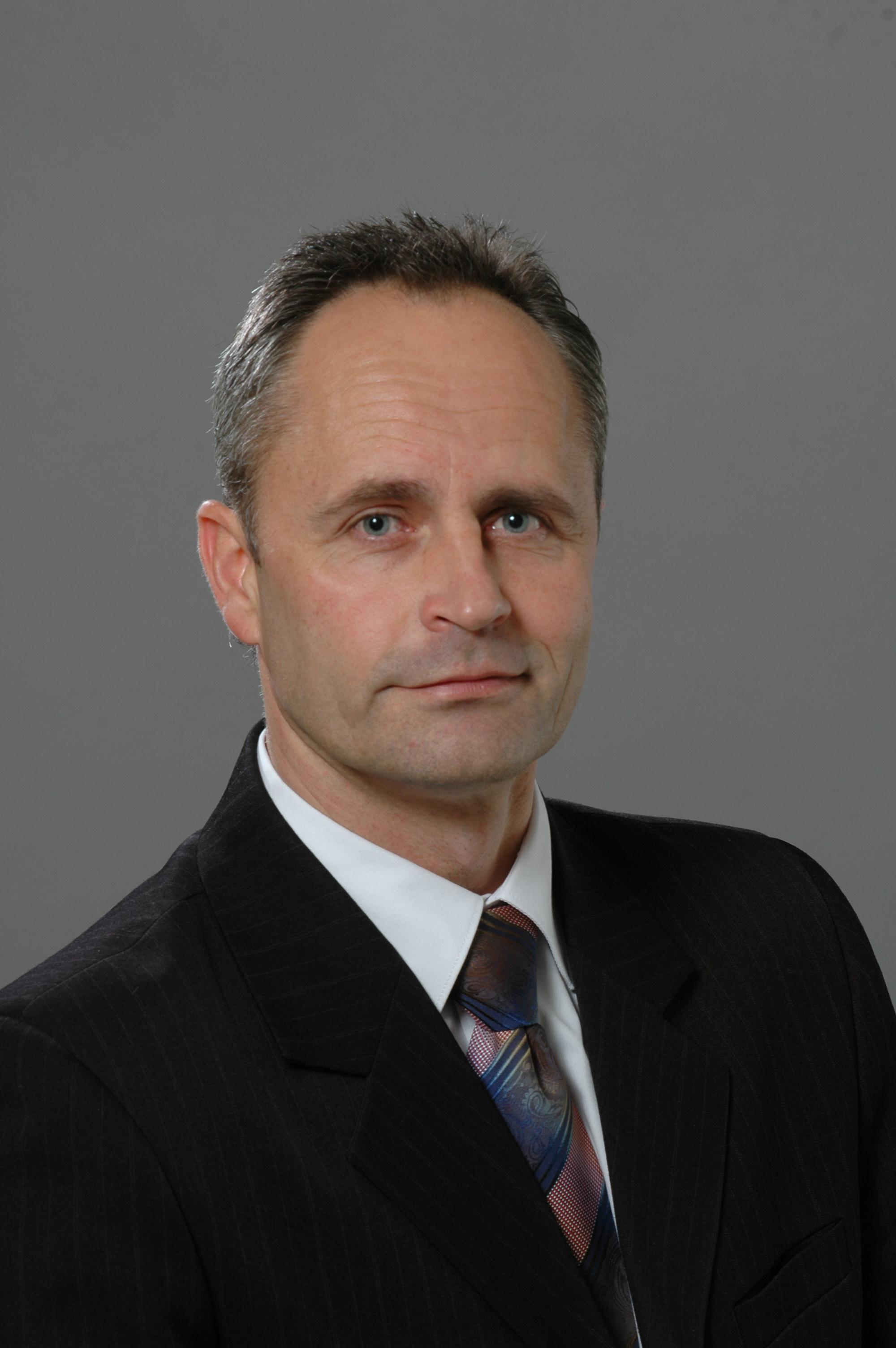 Foto: Saeima